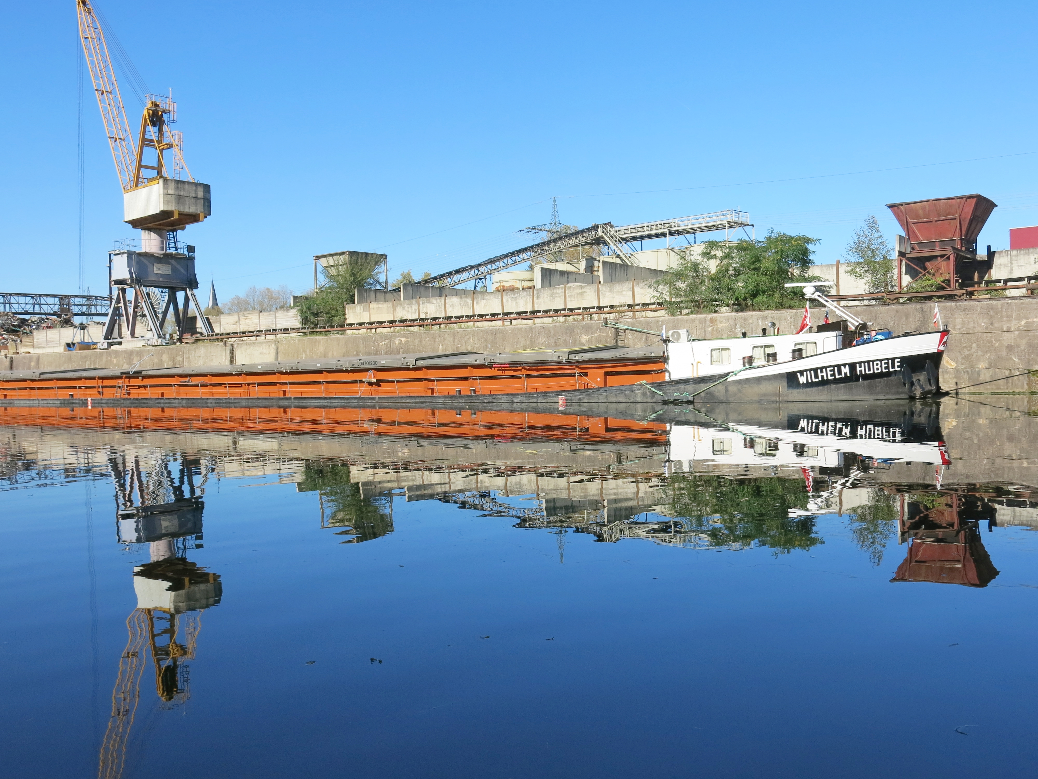 Blick vom Schiff auf den Ludwigsburger Hafenbetrieb in Neckarweihingen am rechten Neckarufer